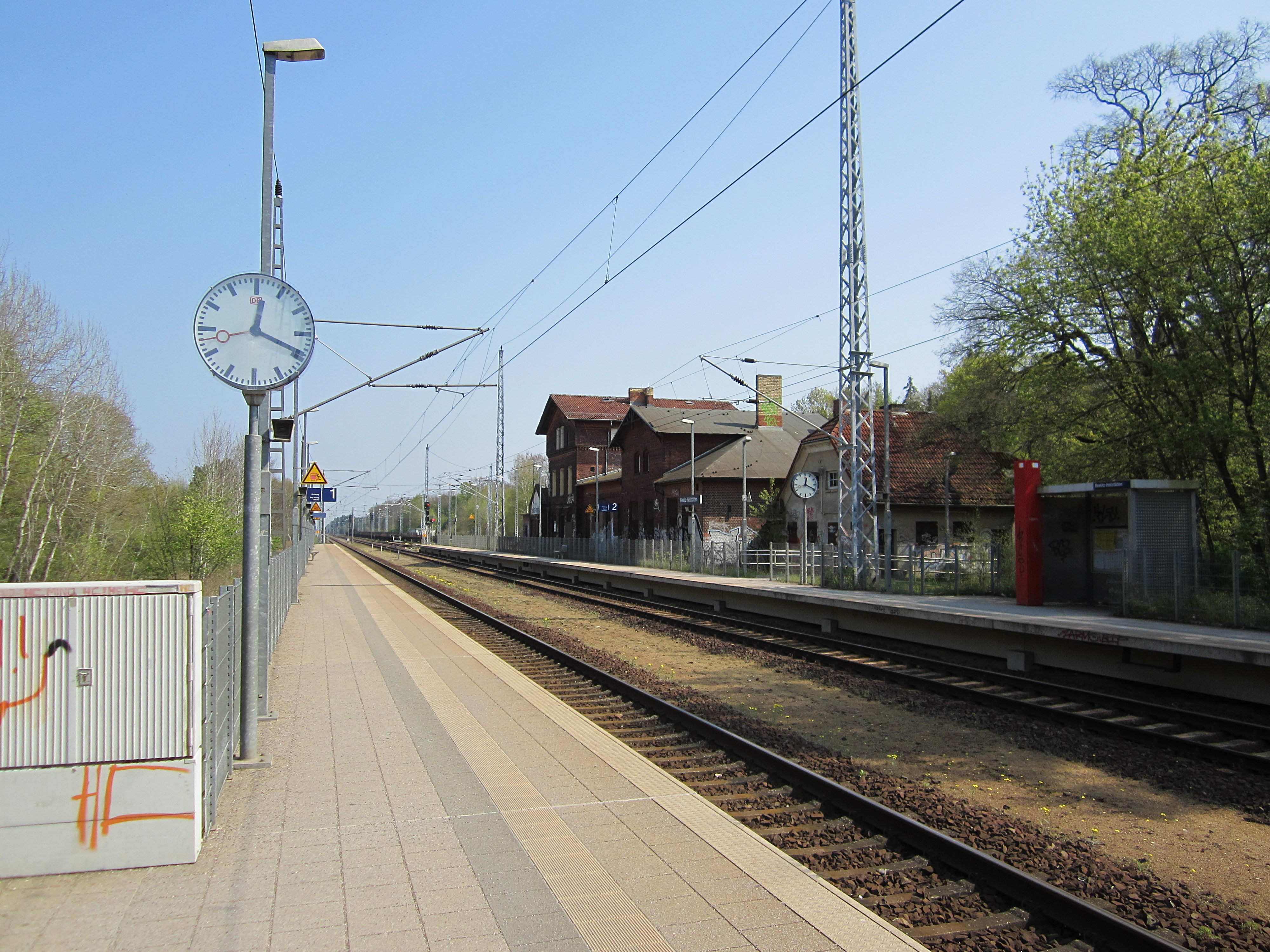 Bahnhof Beelitz Heilstätten